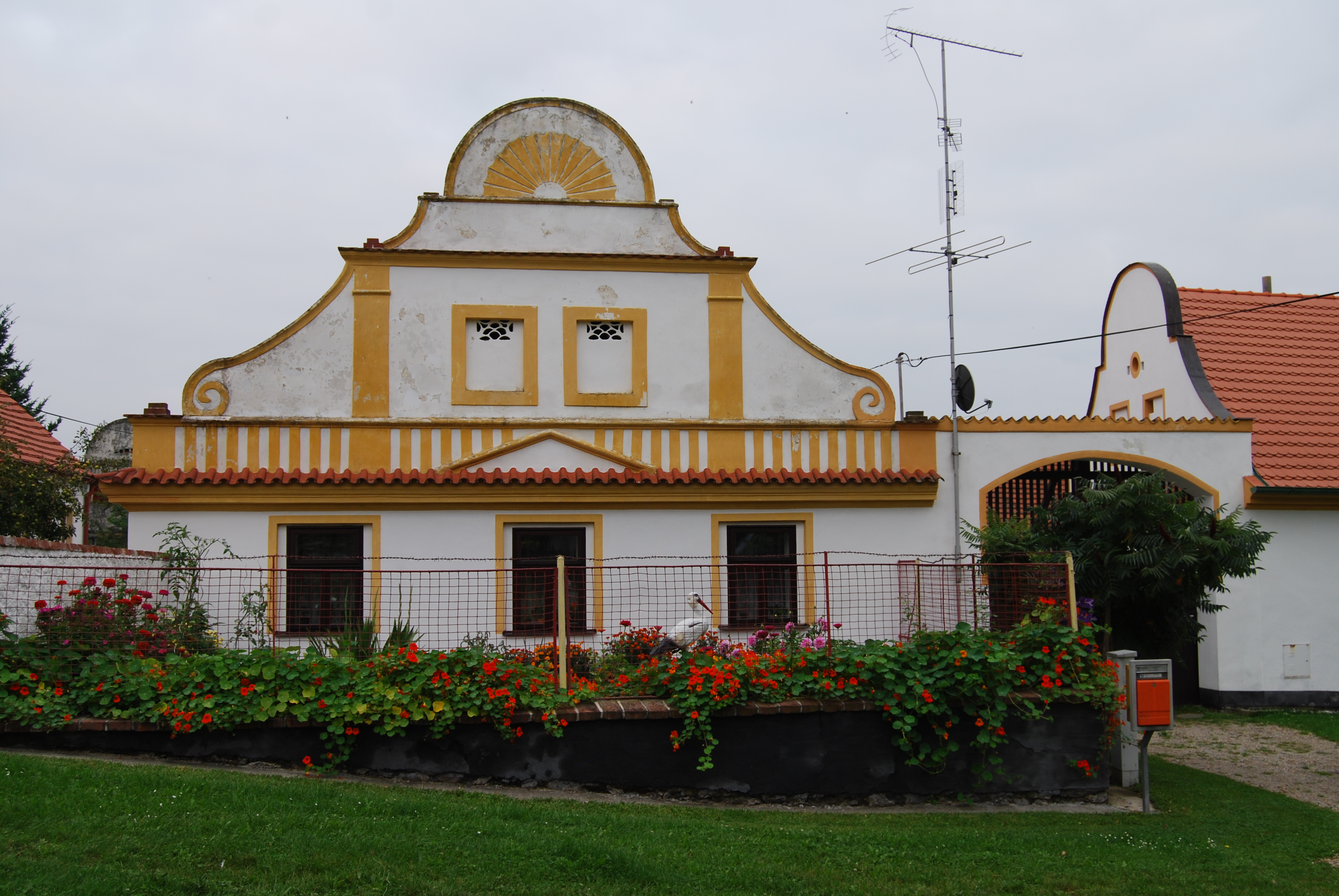 Usedlost v obci čp. 17. Krašovice je část obce Čížová v okrese Písek. Česká republika.